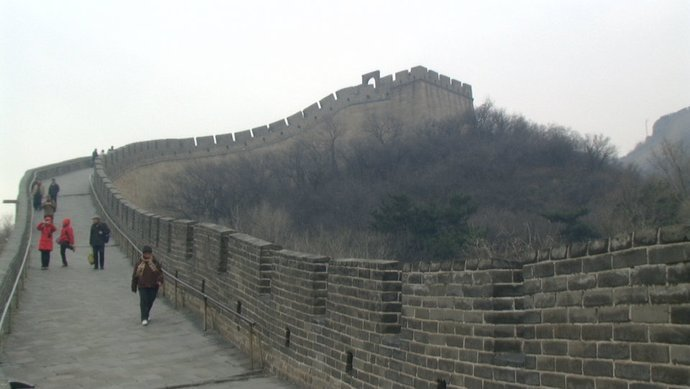 Casi 21.200 Km de longitud hacen de esta muralla, la Gran Muralla China, que atraviesa 15 provincias, regiones autónomas...